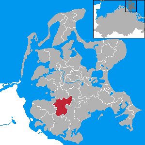 Samtens, Landkreis Rügen, Mecklenburg-Vorpommern